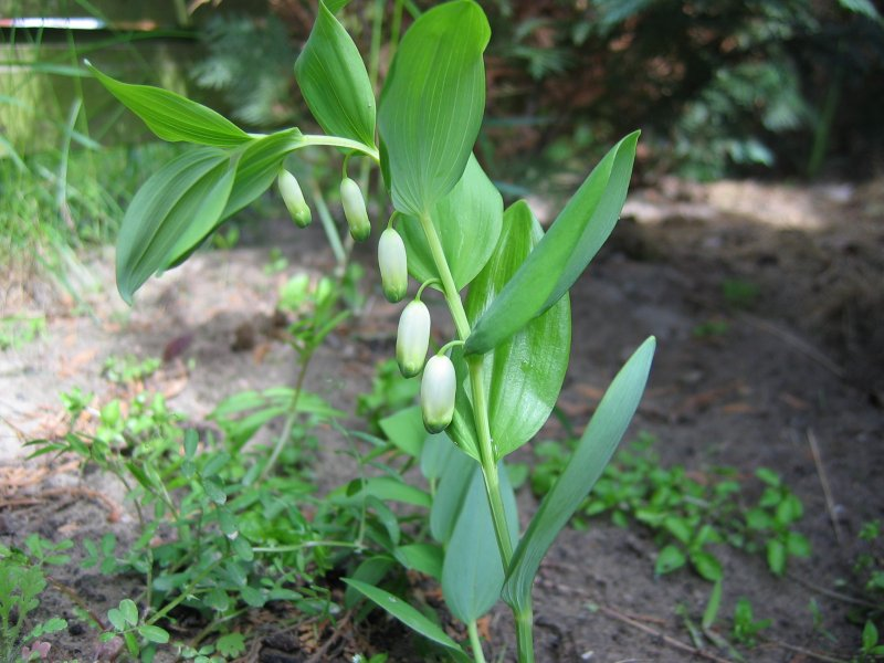 Duftende Weißwurz, Salomonssiegel Polygonatum odoratum